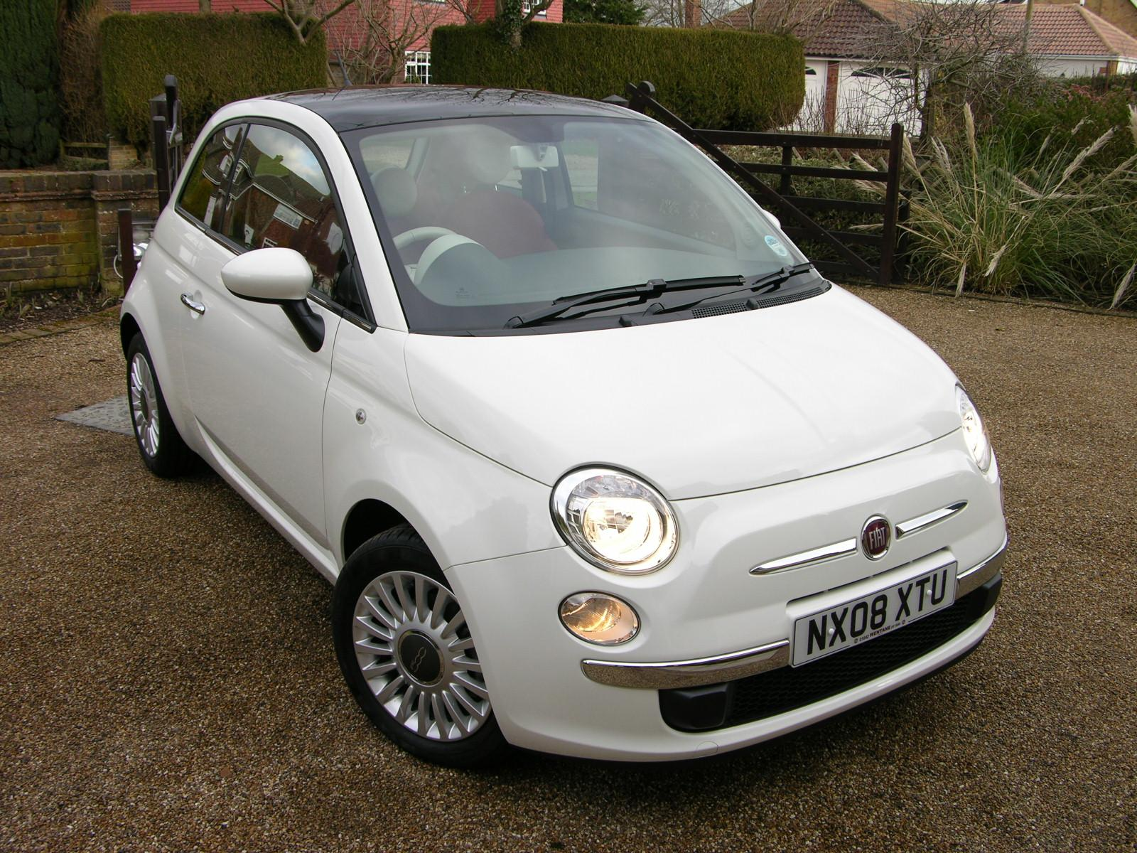 2008 FIAT 500 1.4 Lounge.